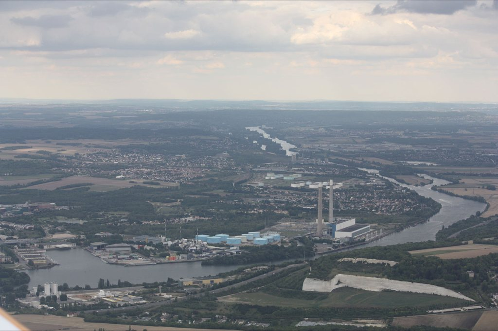 Centrale thermique de Porcheville